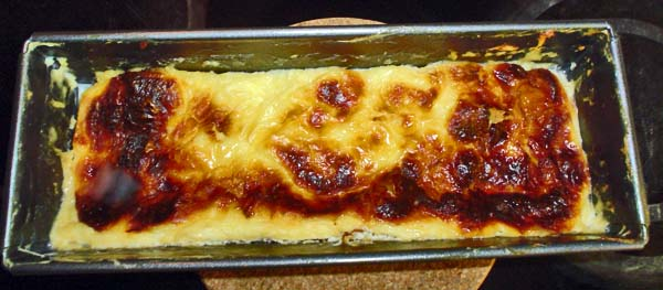 Fotot visar brynosten direkt efter den blivit uttagen ur ugnen